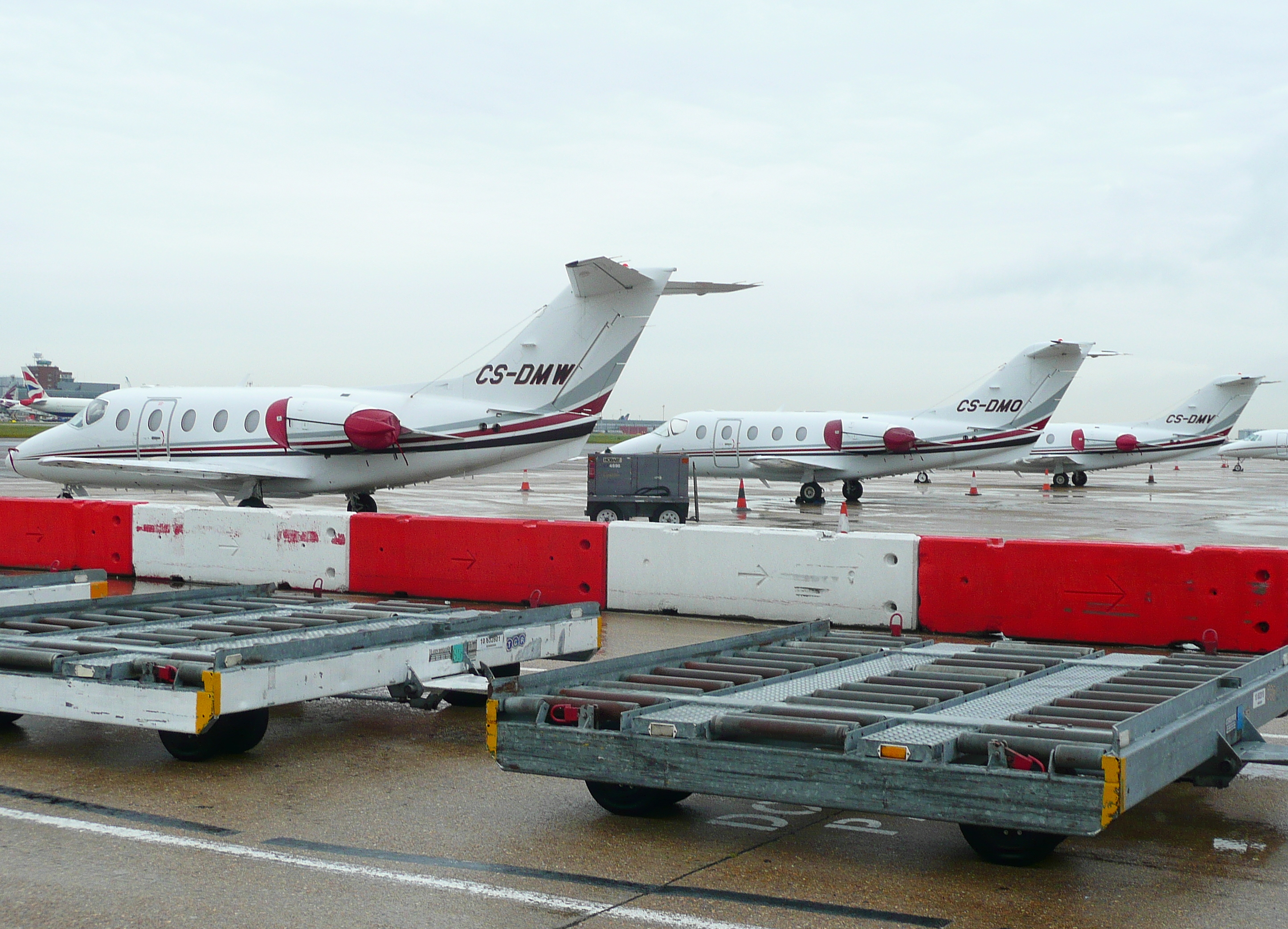 Netjet lineup on std 605 CS-DMW /DMV /DMO Be 400's.